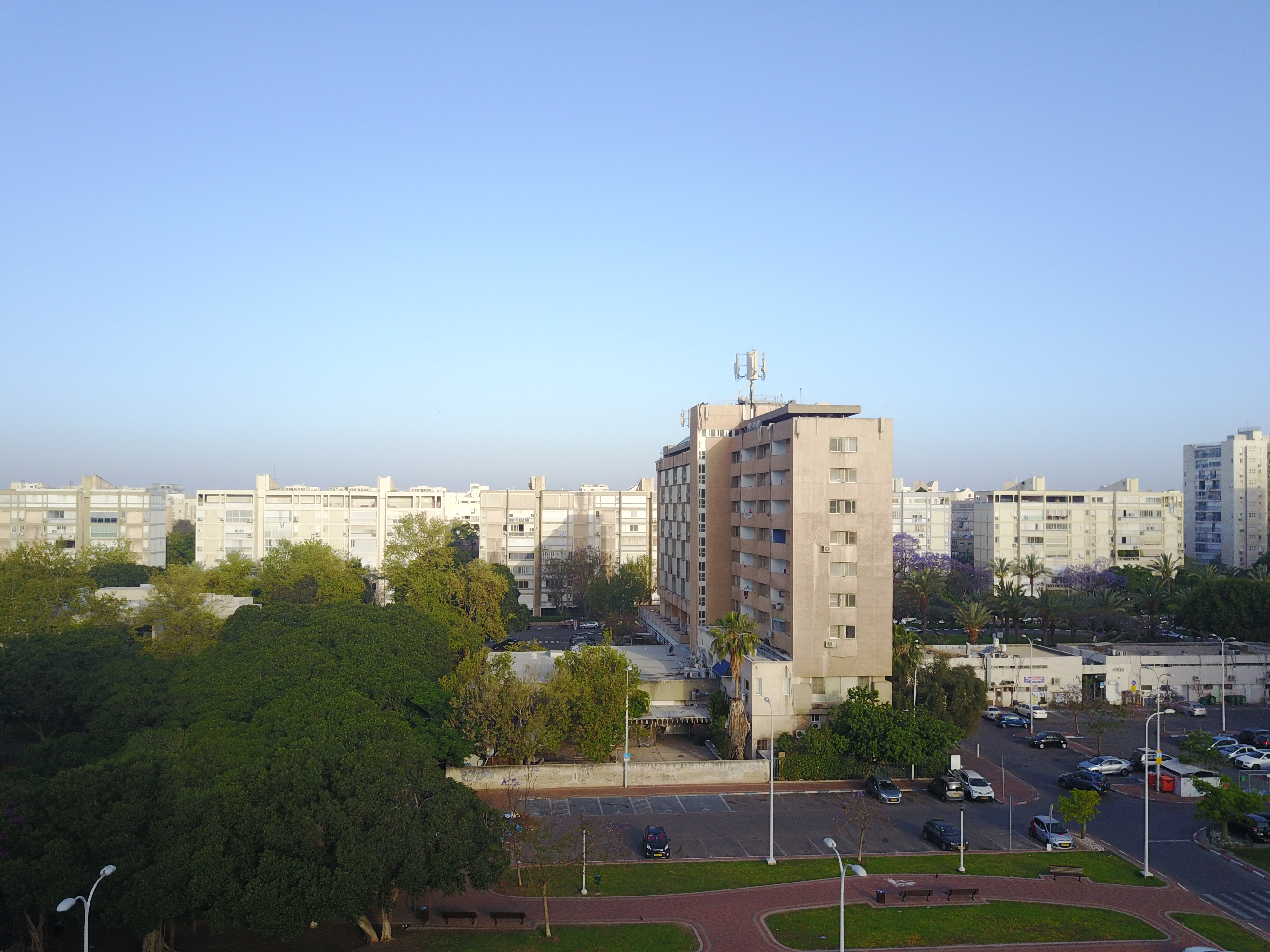 בית מילמן - מעונות הסטודנטים של אגודת הסטודנטים של אוניברסיטת תל אביב - תצלום אוויר